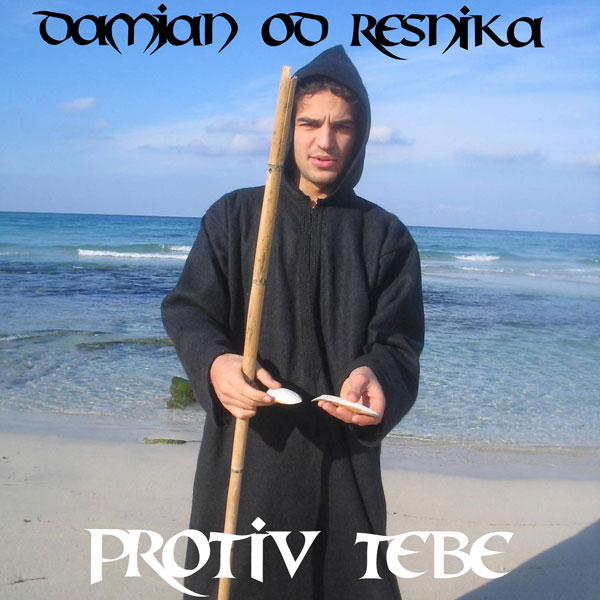 Srpskohrvatski / српскохрватски: Omot drugog studijskog albuma Damjana od Resnika "Protiv tebe" iz 2012. godine. Na slici frontmen benda Damjan Pavlica.